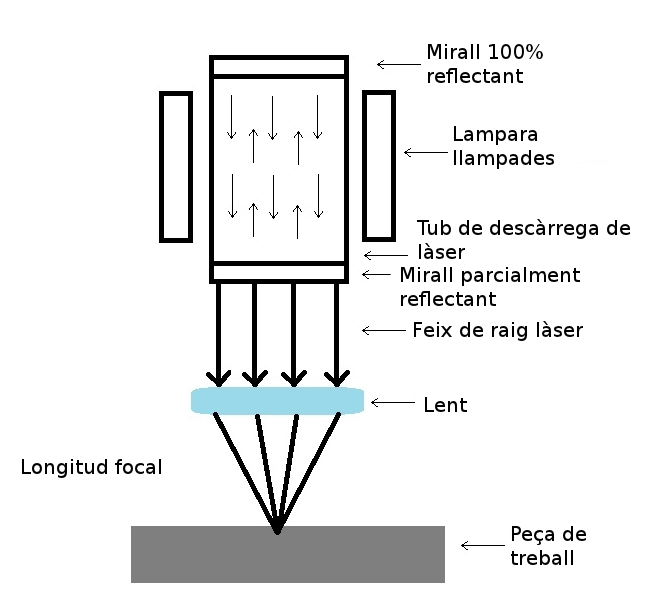 Esquema corte por laser